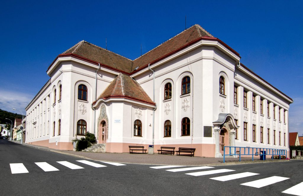 Sídlo školy AKADEMIE STING, Nálepkova 114/52, Stromovka 114/1, Brno-Jundrov.